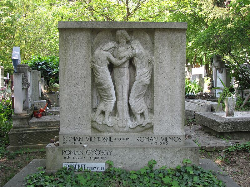 ROMÁN György (Budapest, 1903. január 13.–Budapest, 1981. szeptember 1.) festő, író és családjának sírja Budapesten. Farkasréti temető: 7/8-1-814/815.